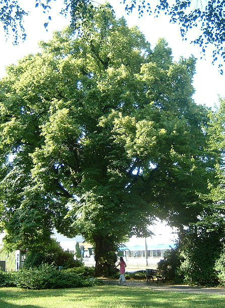 Der Eschersheimer Lindenbaum. Alte Linde in Frankfurt-Eschersheim, Naturdenkmal, gepflanzt: Ende des 17. Jahrhunderts, 5 m Stammumfang. Standort: U-Bahnstation Am Lindenbaum.